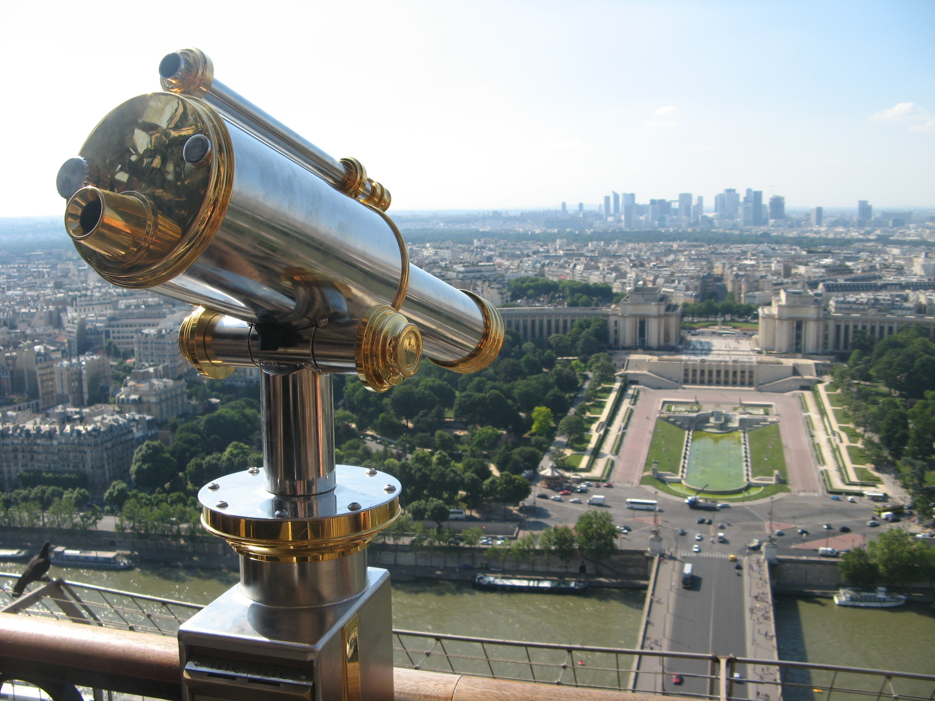 Paris :: Desde la Torre Eiffel